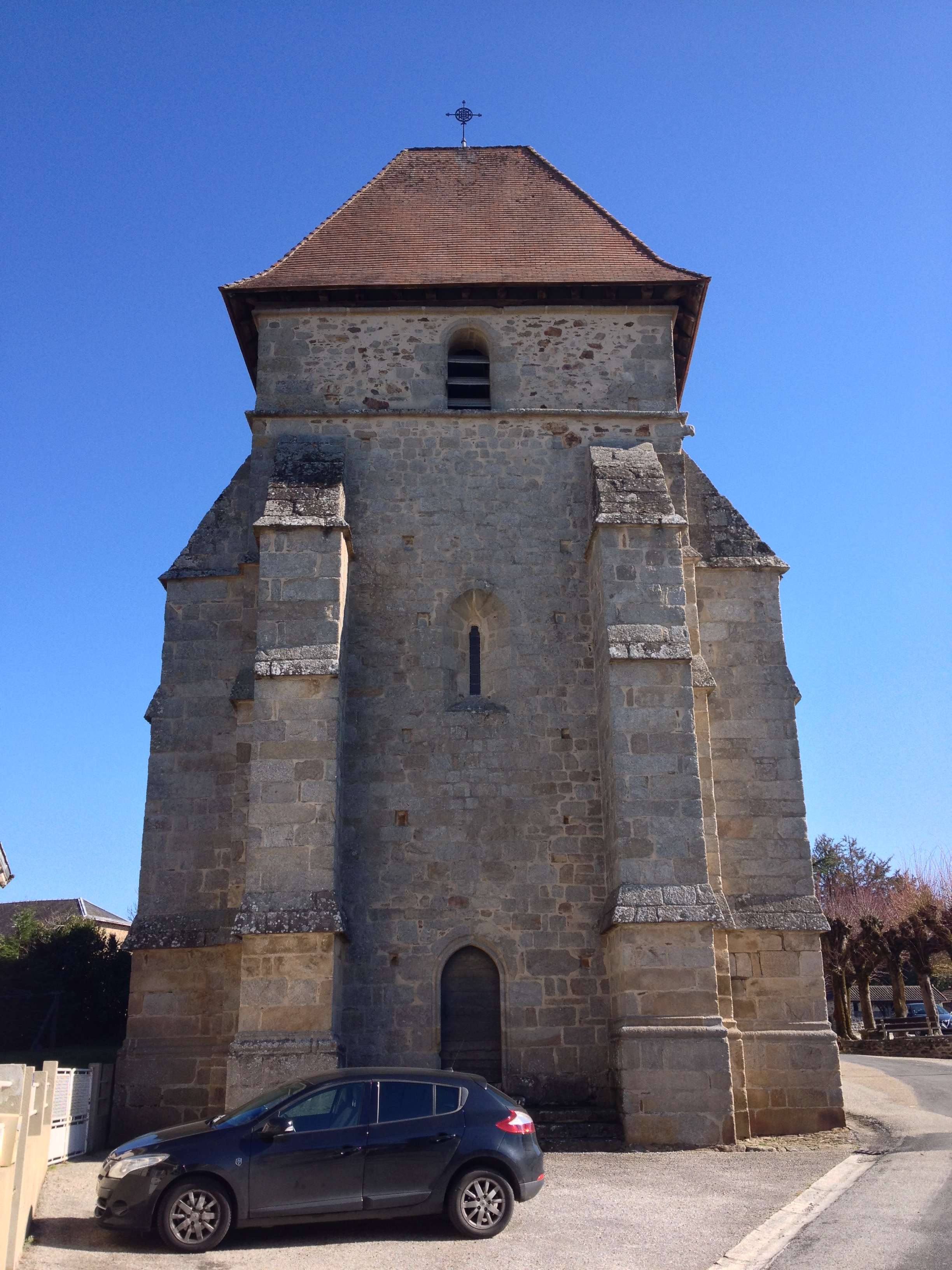 L'église de la Décollation de Saint-Jean-Baptiste de Neuvic-Entier, place de l'église. .